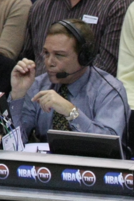 マイク・フラテロ TNT解説